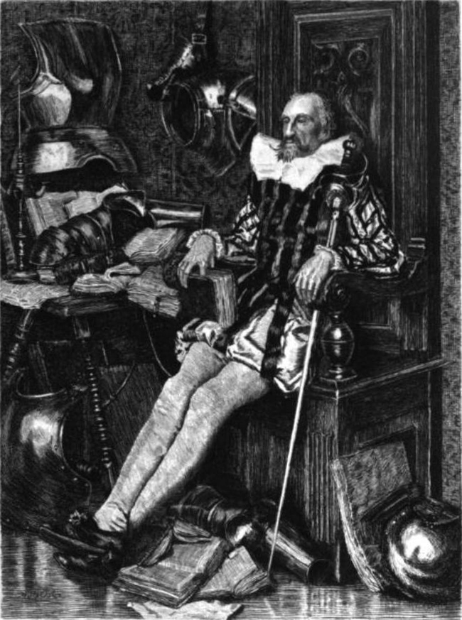 Don Quijote de la Mancha's Library